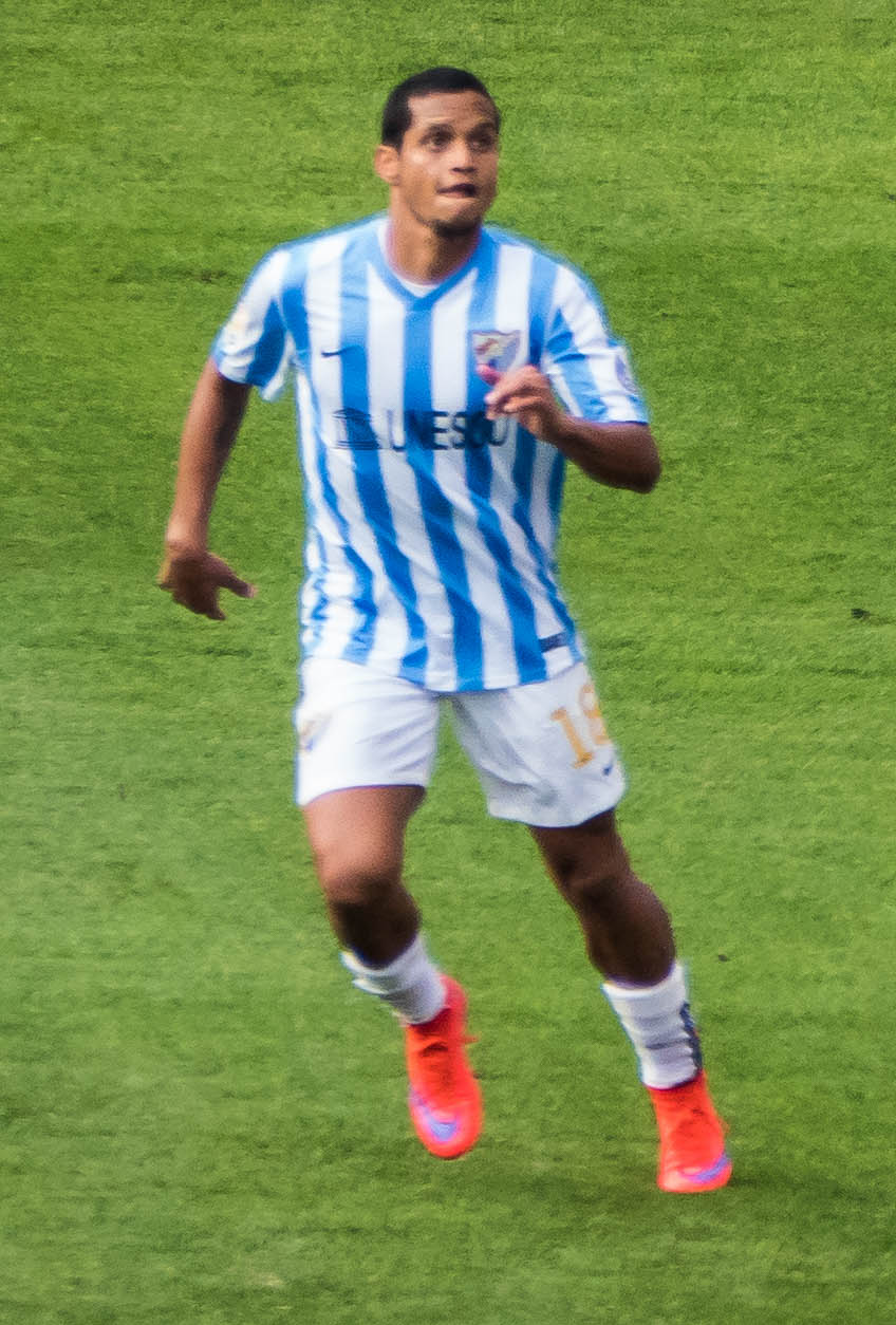 Partido Málaga - Sevilla 23/5/2015